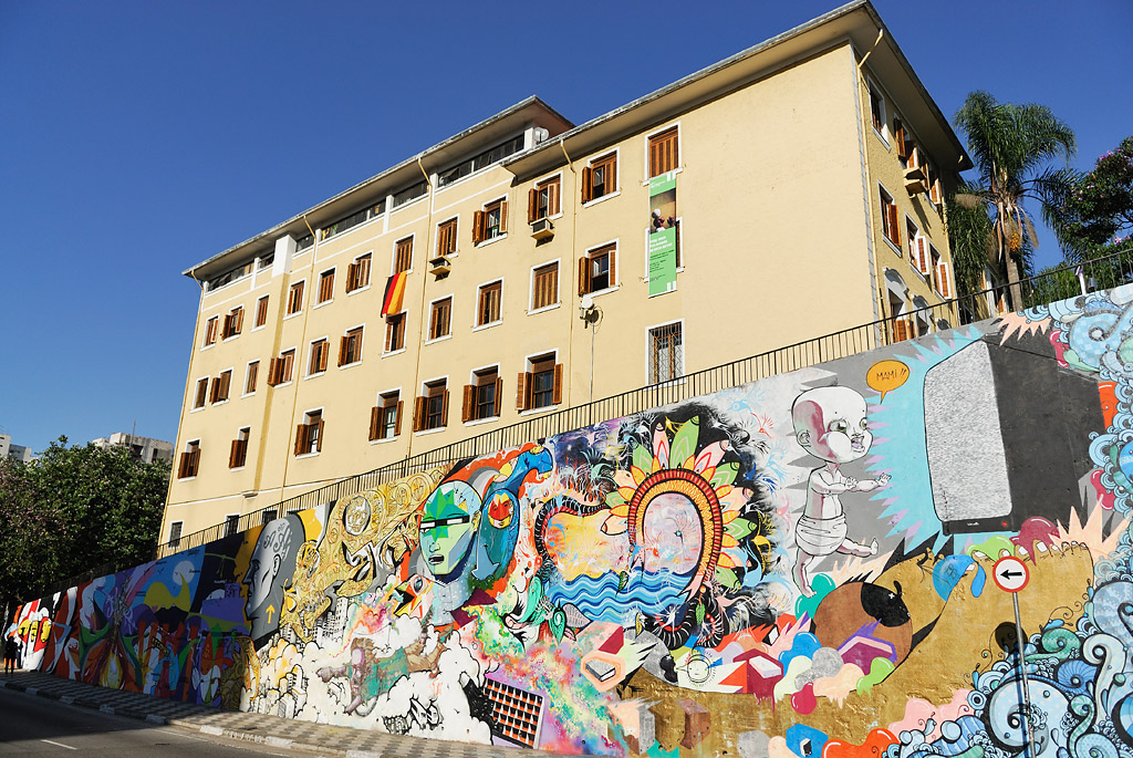 Foto Jochen Weber